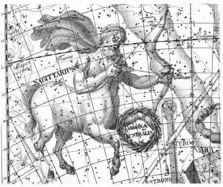 Sagittarius